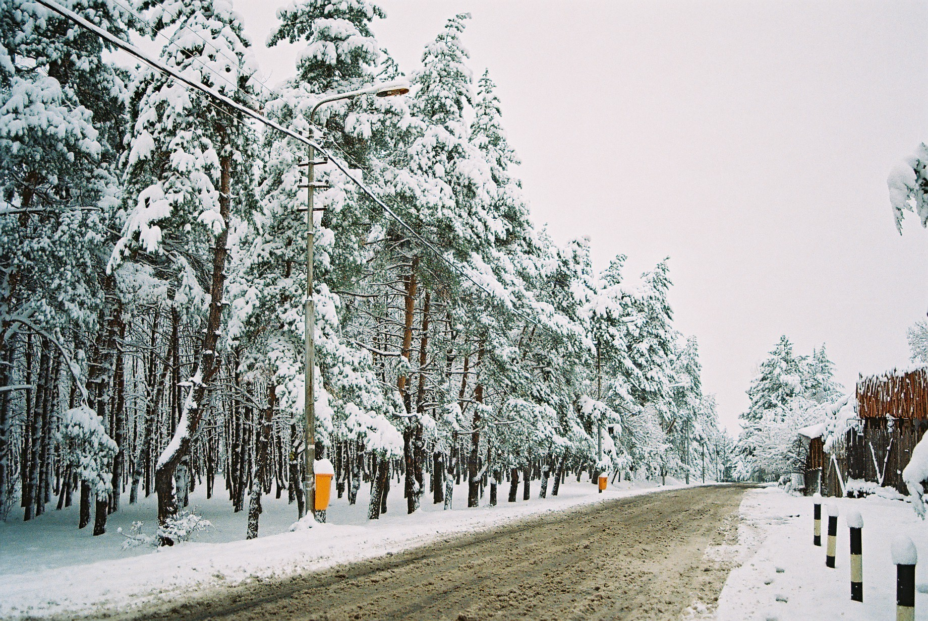 წყნეთი.